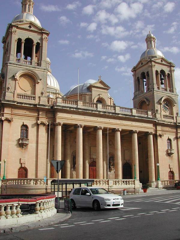 Picture: church in Paola, Malta (October 2003) Author: bulbul Il-Kawboj ghaddej bil-karozza il pjazza. Il-Hadd filghodu. Sejjer jixtri l-pastizzi minghand il-Maxman.